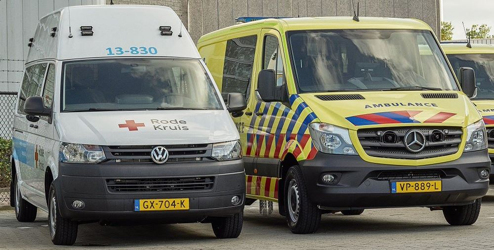 2 soorten calamiteitenvoertuigen